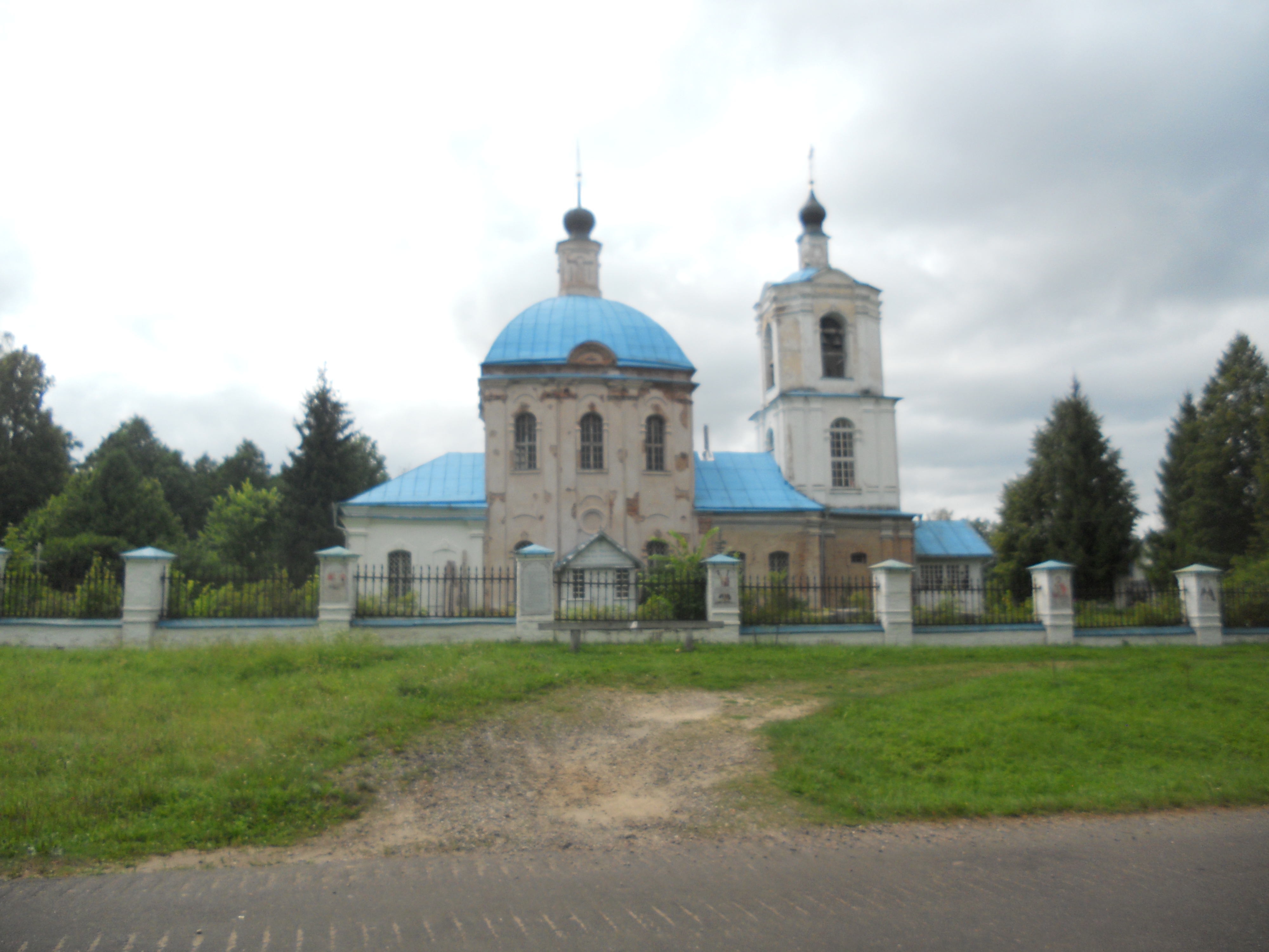 Церковь Преображения. Построена в 1786г.